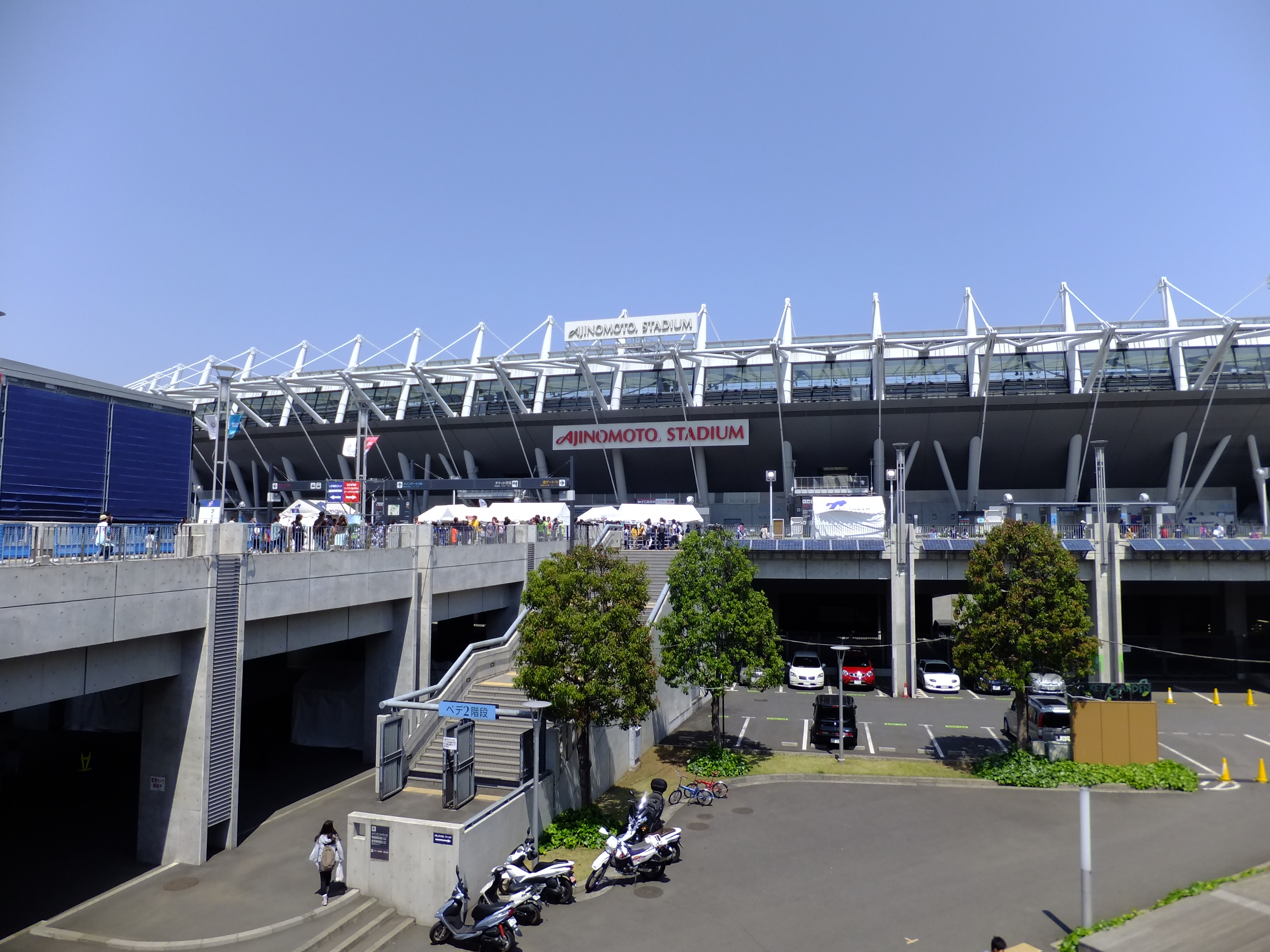 味の素スタジアム、FC東京vsジュビロ磐田の試合開始前